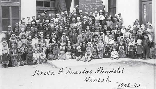 Балистички клас во ОУ Анастас Пандели, вруток